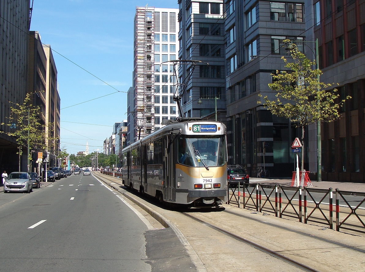 Motrice 7942 sur l'Avenue Fosney en direction de Montgomery